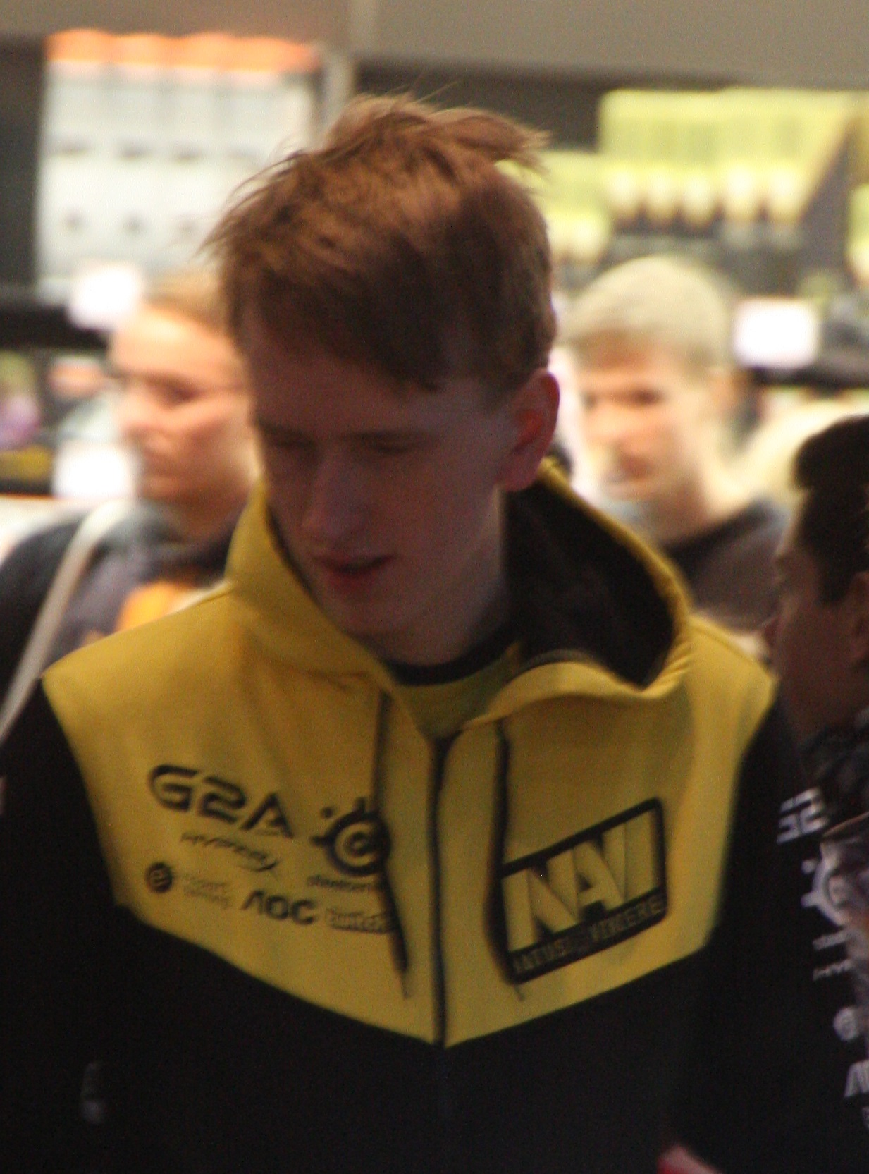 Hearthstone Spieler "Xixo" (Sebastian Bentert) auf der DreamHack Leipzig 2016